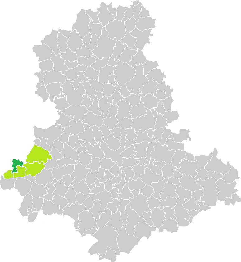 Carte de situation de la commune de Videix (en vert foncé) dans le votre Canton (en vert clair) sur une carte des communes de la Haute-Vienne